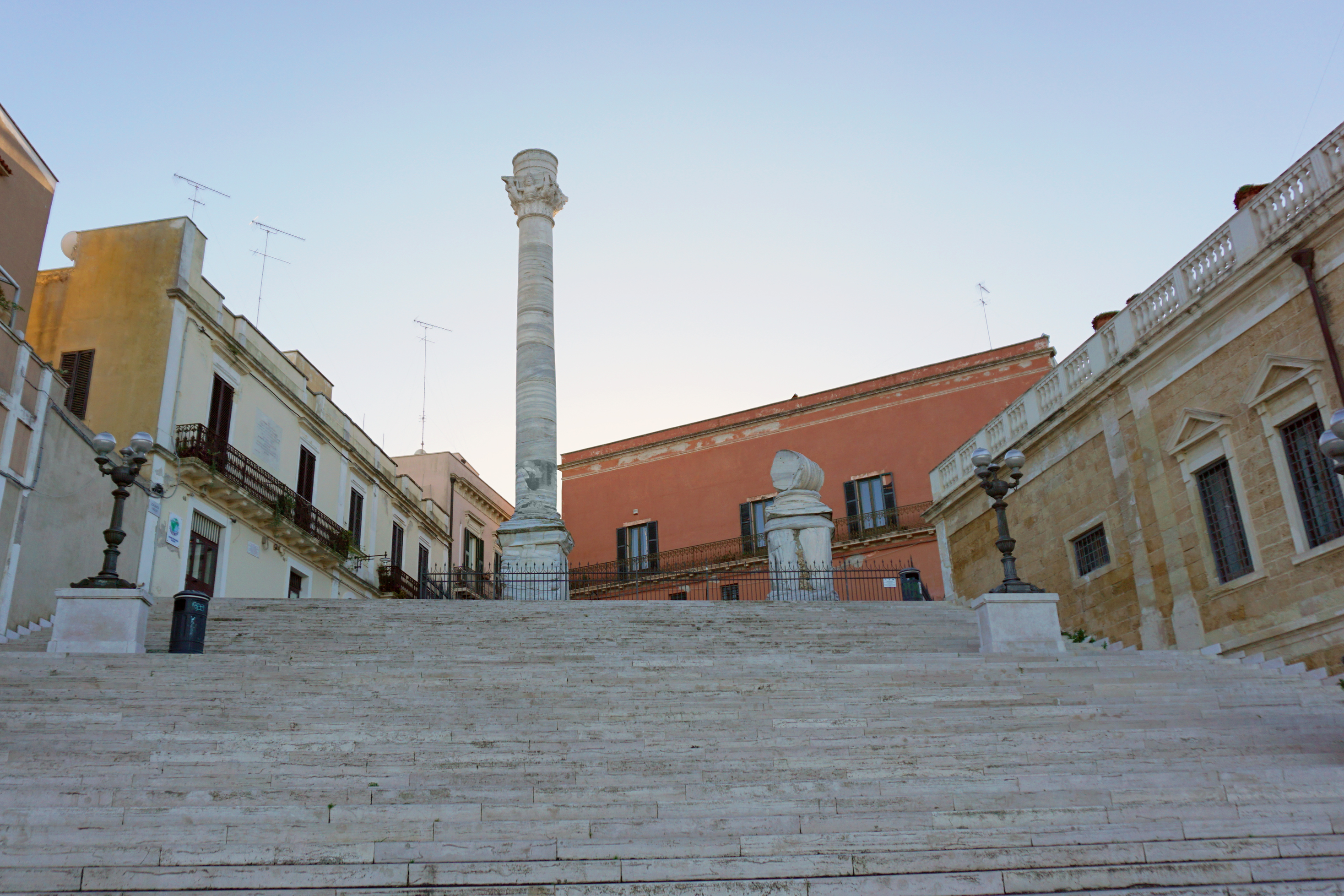 Le colonne romane di brindisi